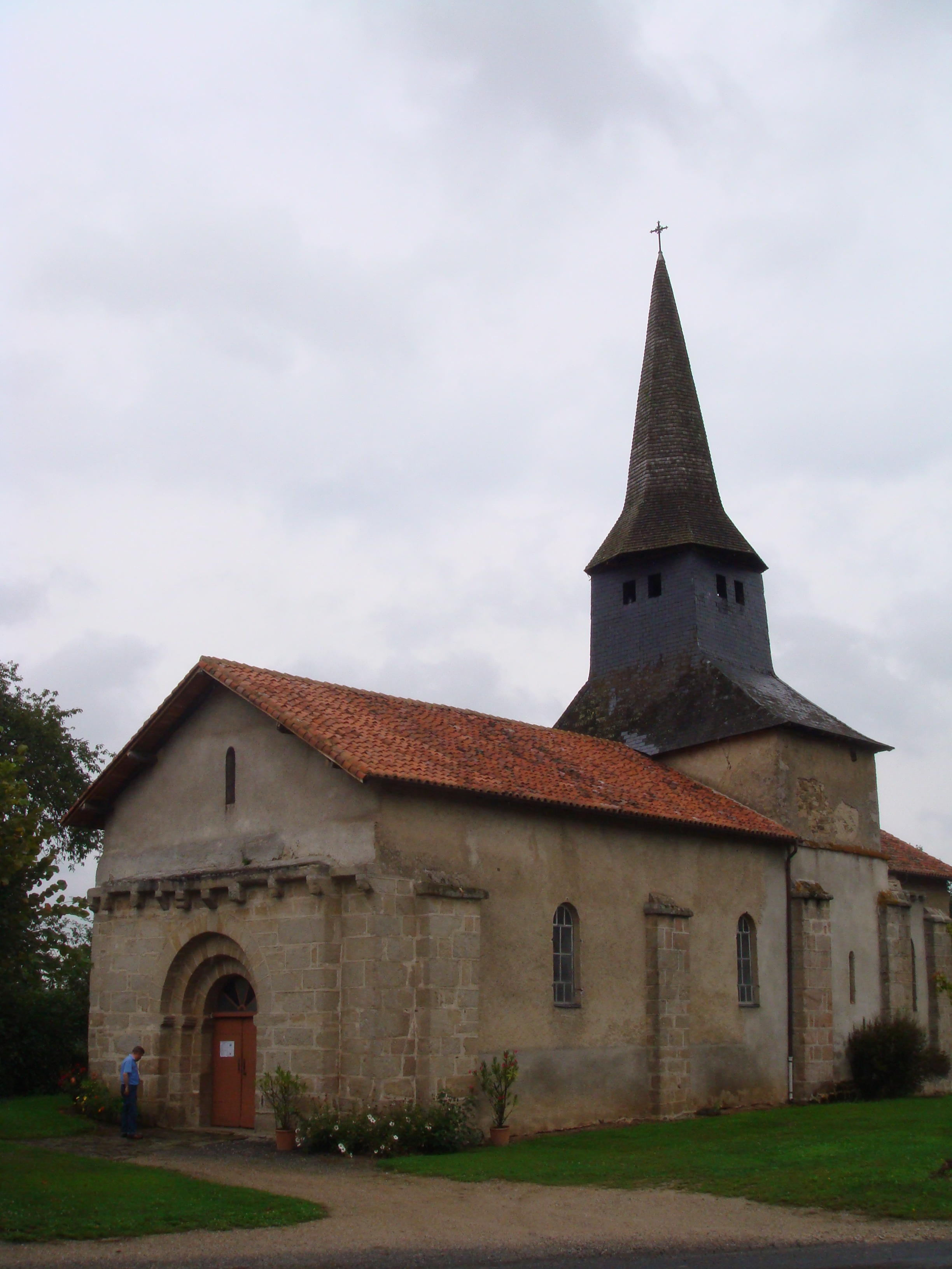 Église de Roziers-Saint-Georges, (Inscrit, 1973) .